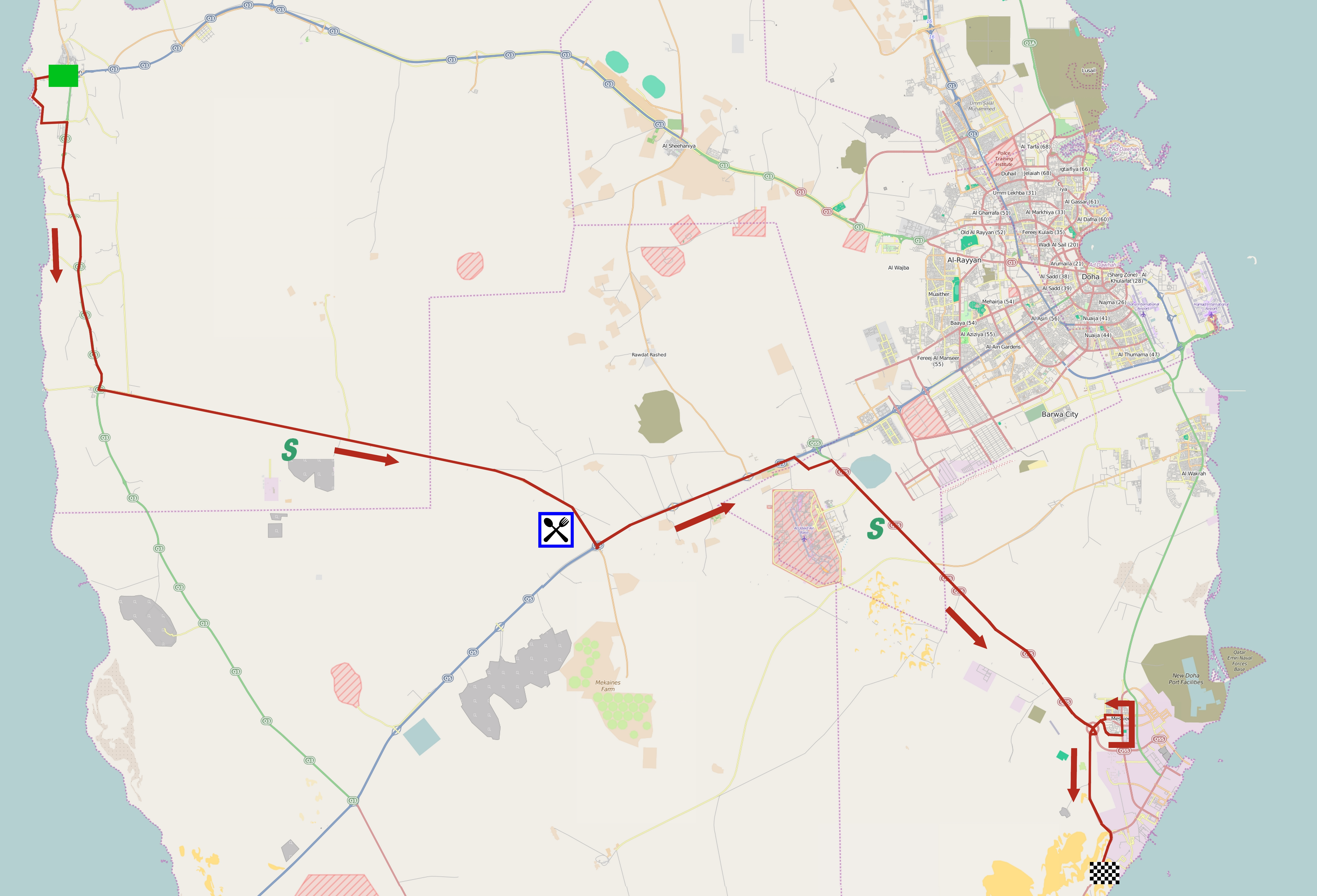 Parcours de la première étape du Tour du Qatar 2015. This map may be incomplete, and may contain errors. Don't rely solely on it for navigation.